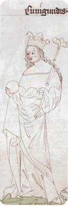 Kunhuta Uherská